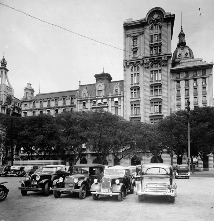 Buenos Aires. Vista del edificio del Archivo General de la Nación en su entrada por la calle Leandro N. Alem 246. Autos estacionados en la actual Plaza del Correo, ca. 1930. Documento Fotográfico. Inventario 29991